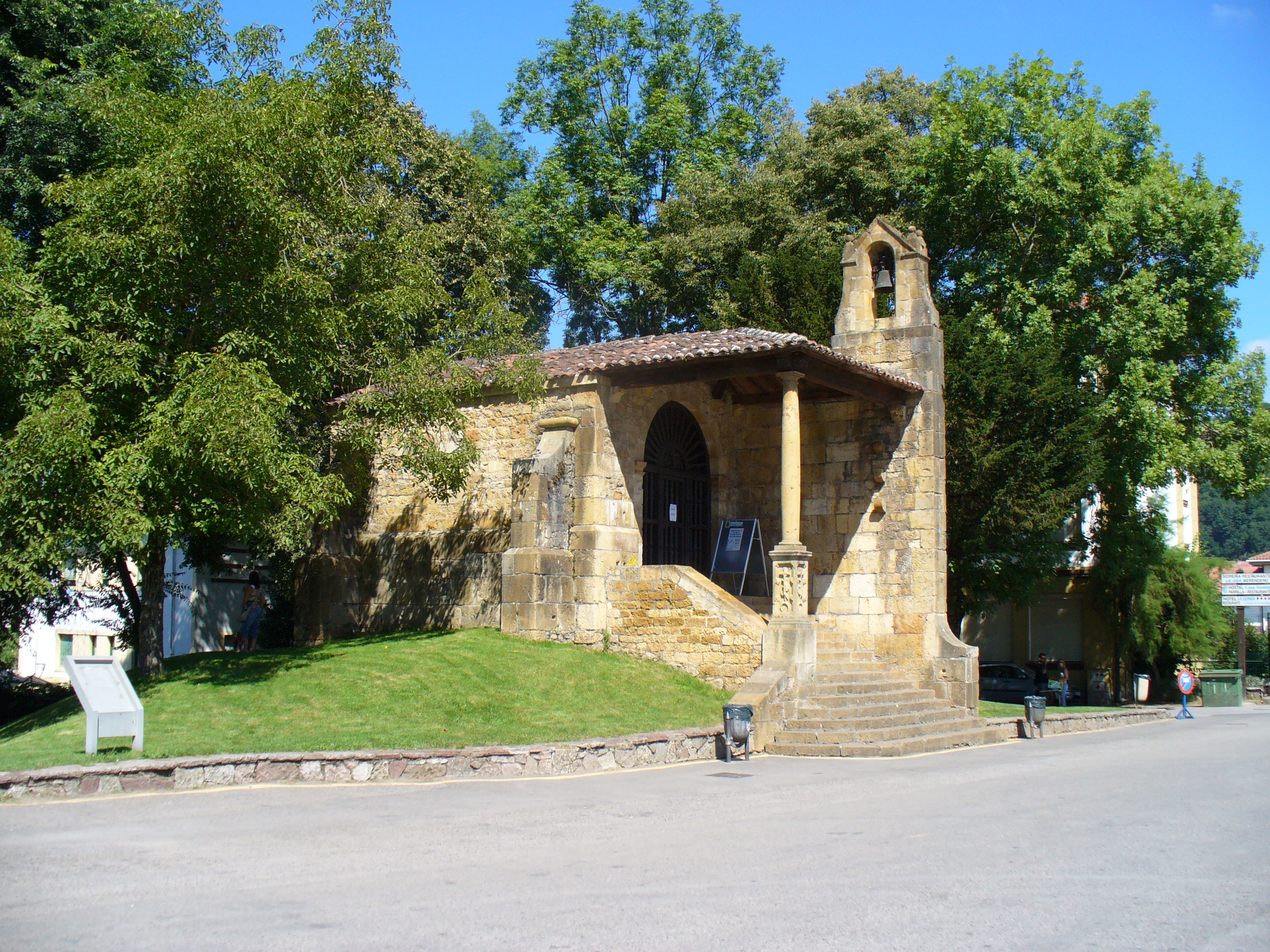 Ermita de Santa Cruz de Cangas de Onís.